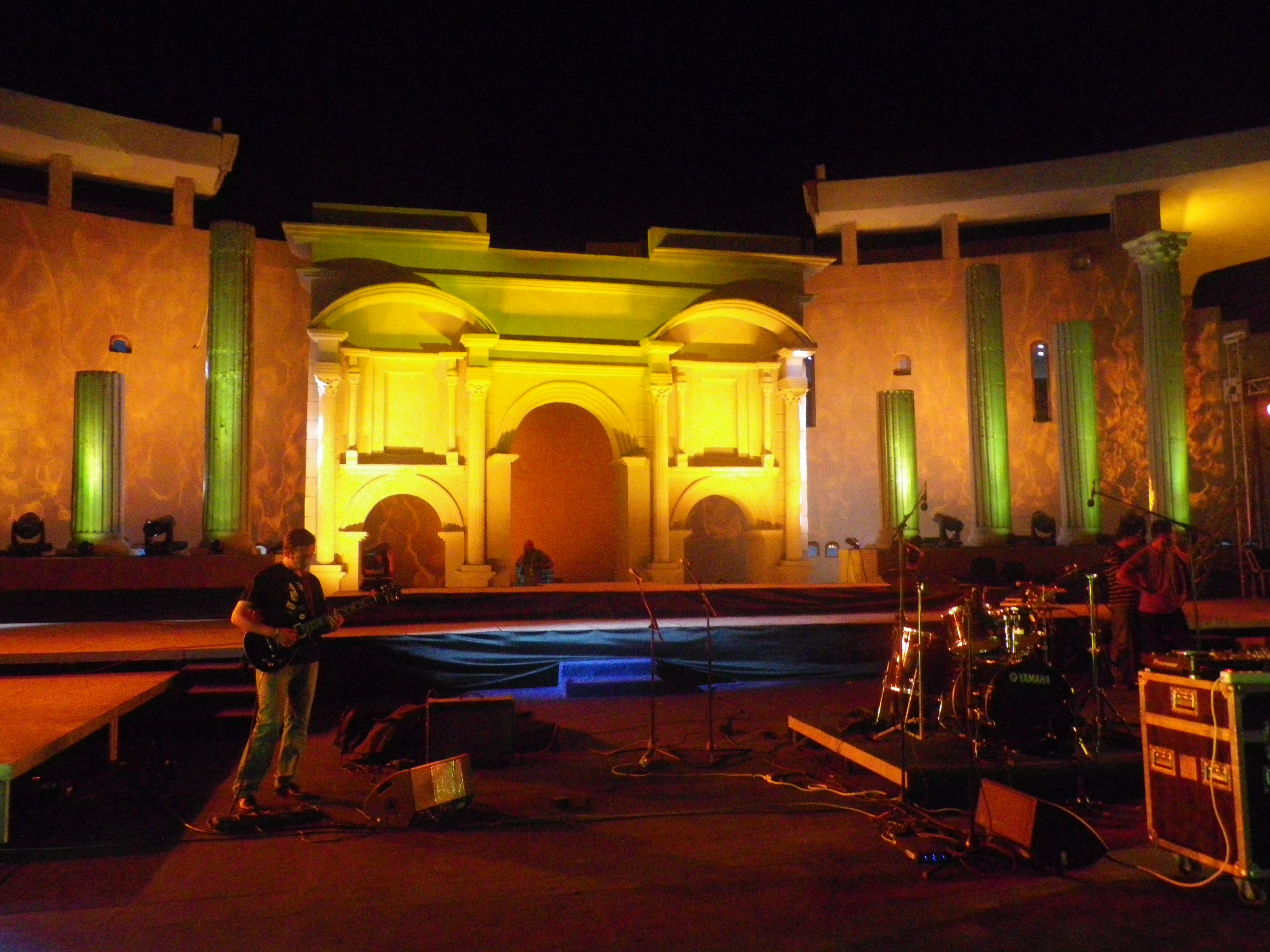 Arrière plan de l'arc de Trajan dans le nouveau théâtre du Festival International de Timgad (FIT), Algérie.